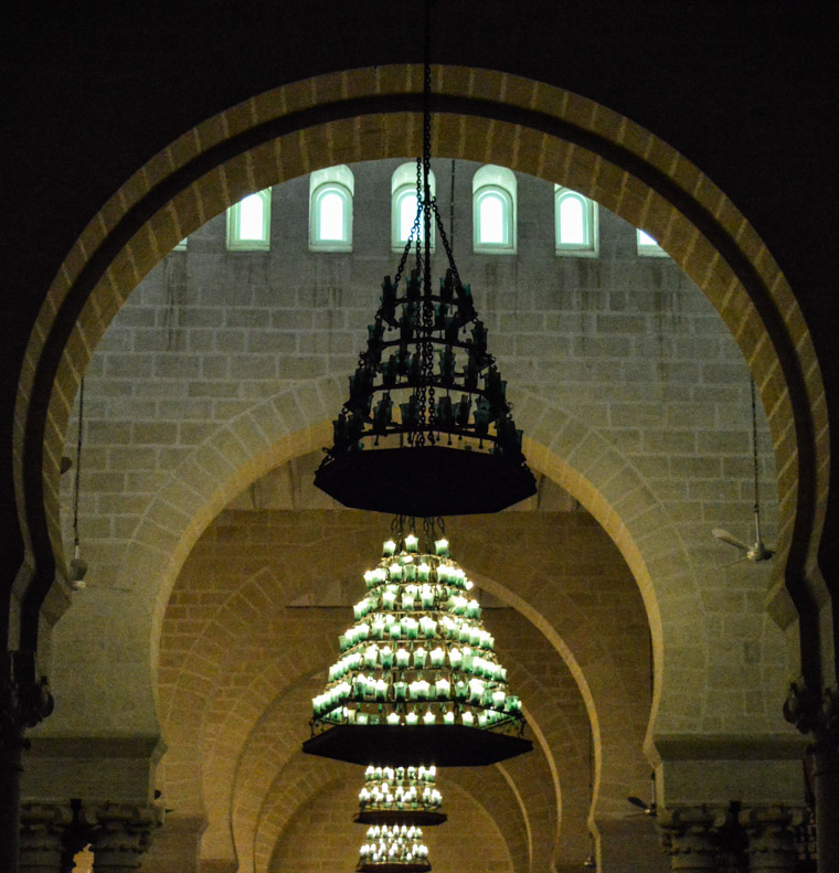 Grande mosquée et son ancien minaret